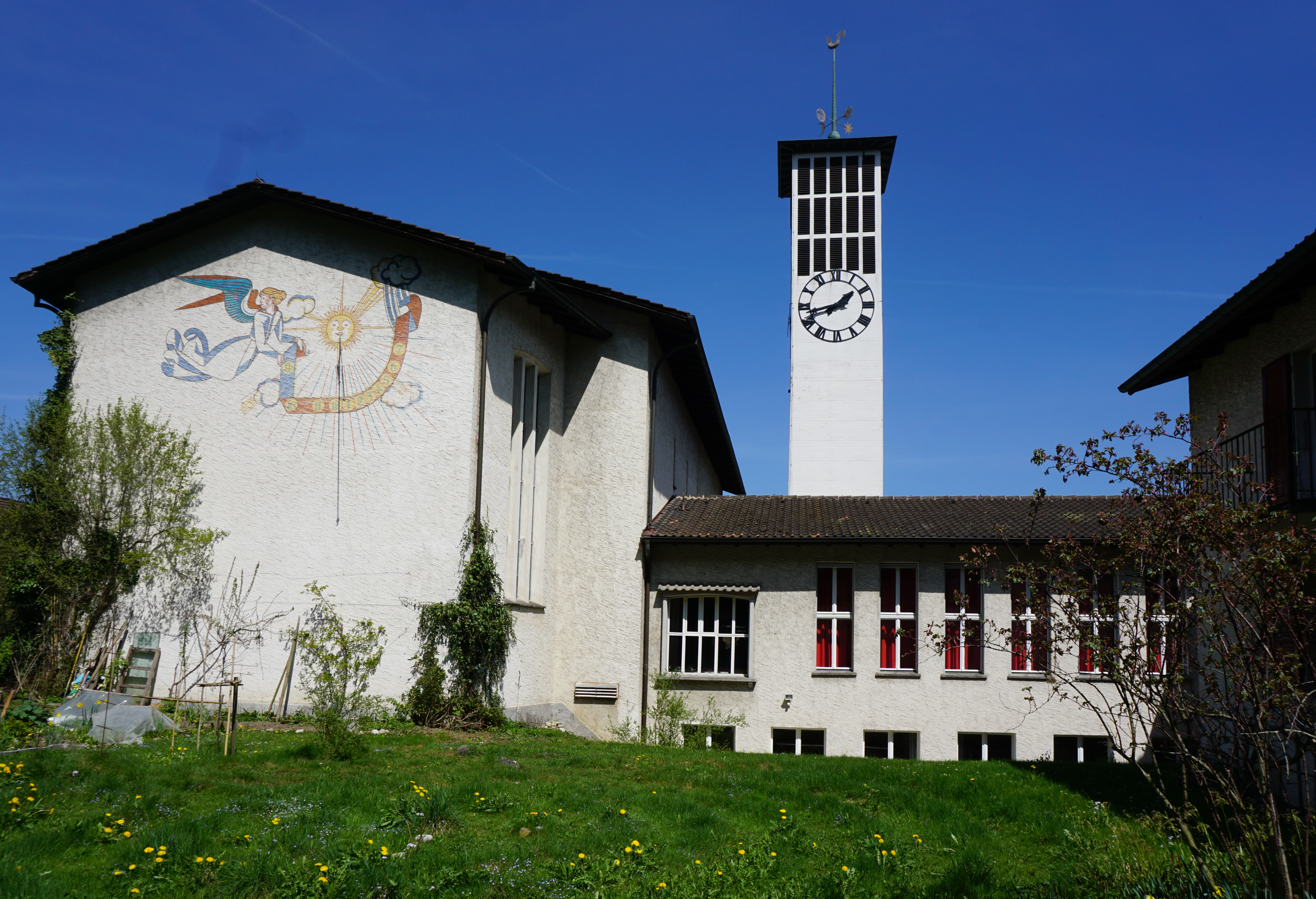 Kirche Wabern von Südwesten, mit Turm und Gemeindesaal